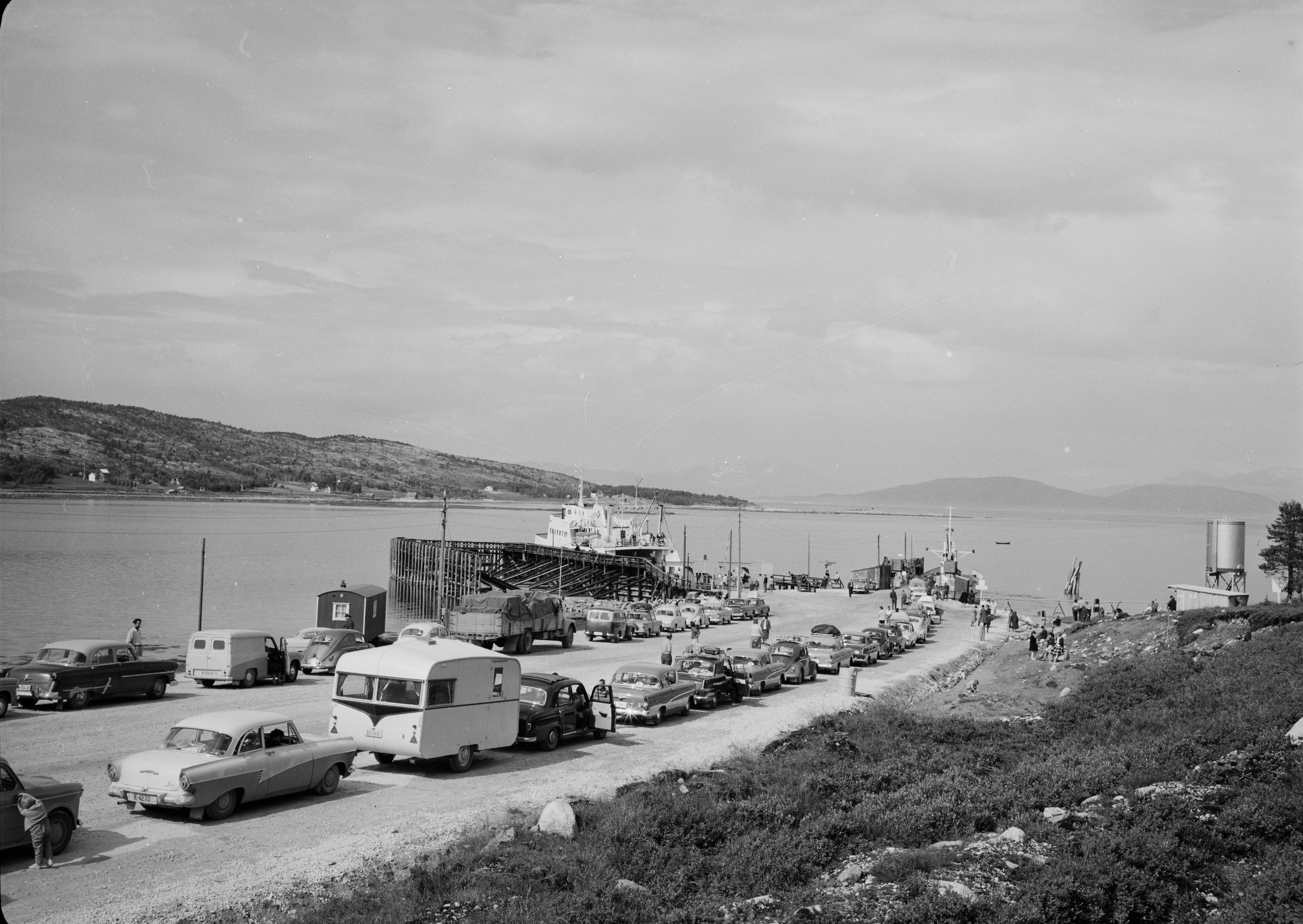 Bildet er hentet fra Nasjonalbibliotekets bildesamling. Anmerkninger til bildet var: Fotograf: ÅL Bognes, Tysfjord, Nordland